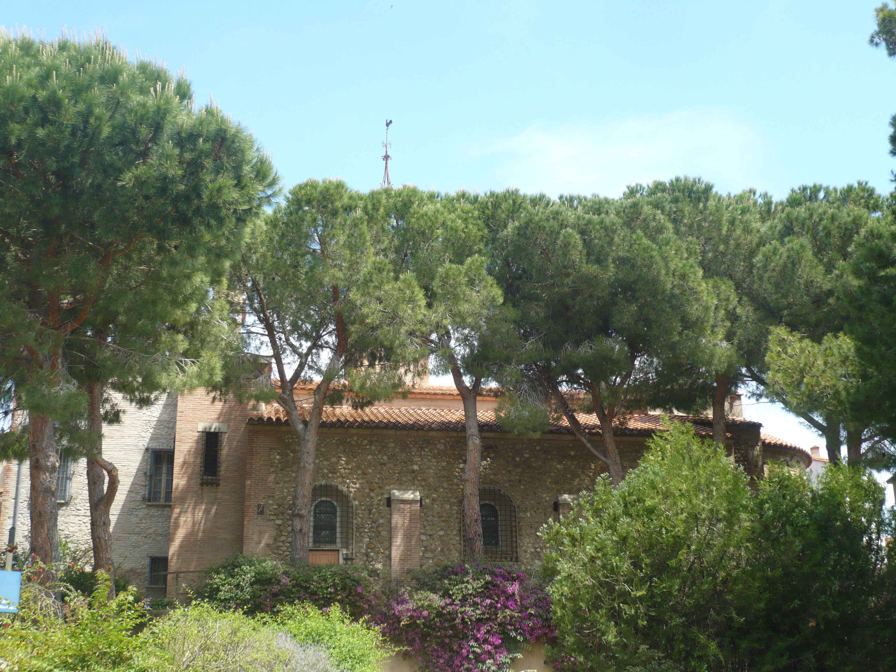 Face sud de l'église Notre-Dame-des-Anges à Cabestany